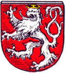 Das alt Wappen der Stadt Kłodzko (Glatz)